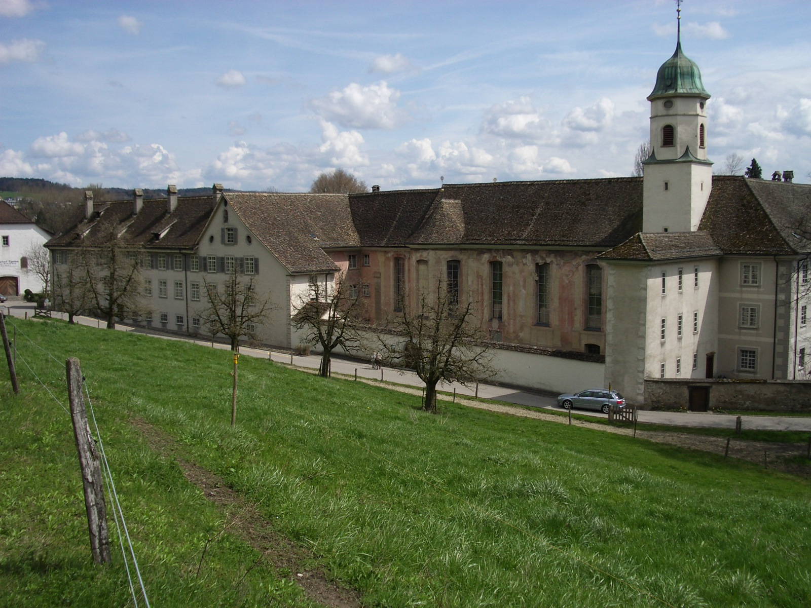 Kloster Fahr, Switzerland self-made, April 2006